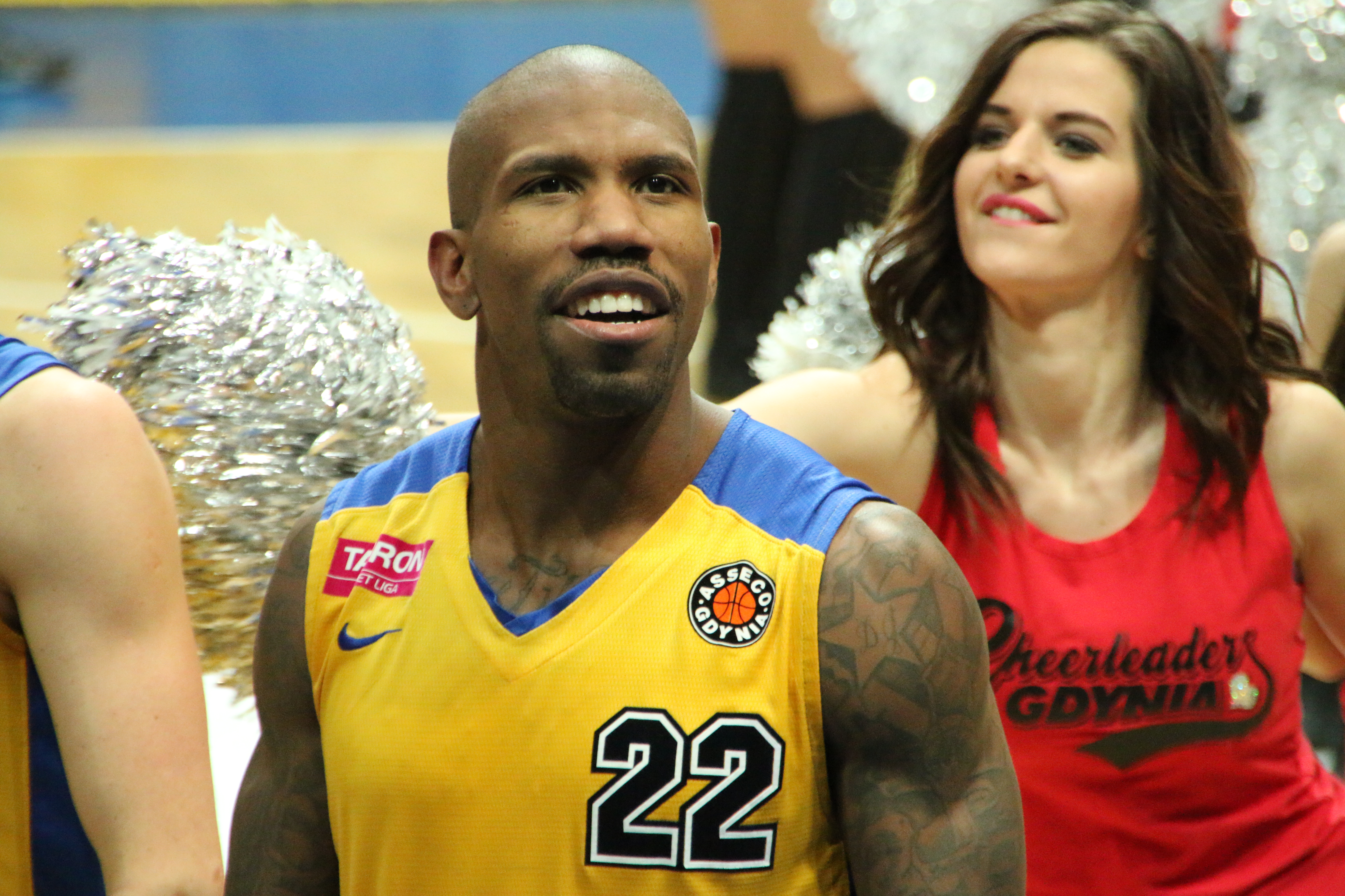 AJ Walton Asseco